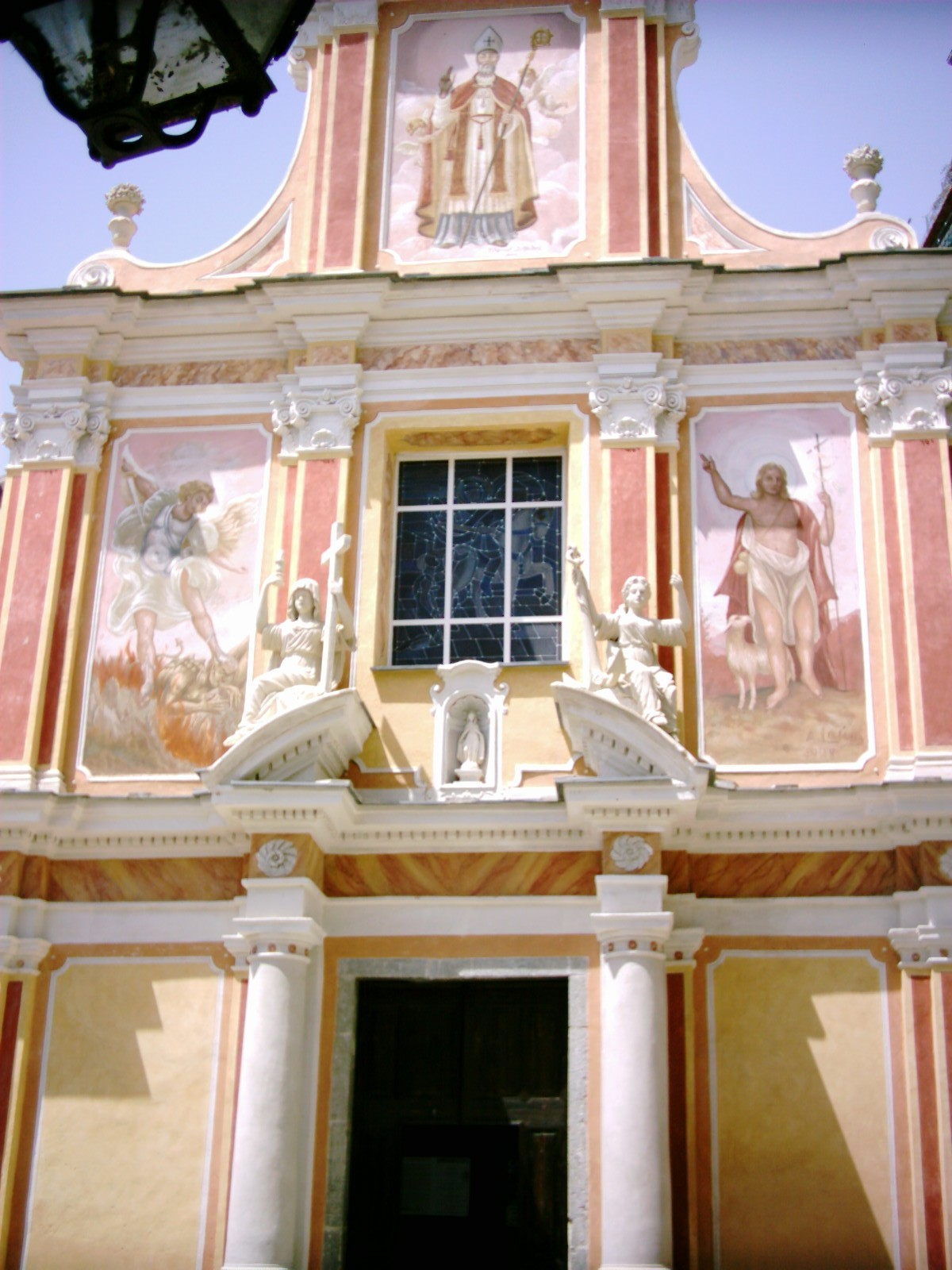 Seborga, Liguria, Italy - Chiesa parrocchiale di San Martino